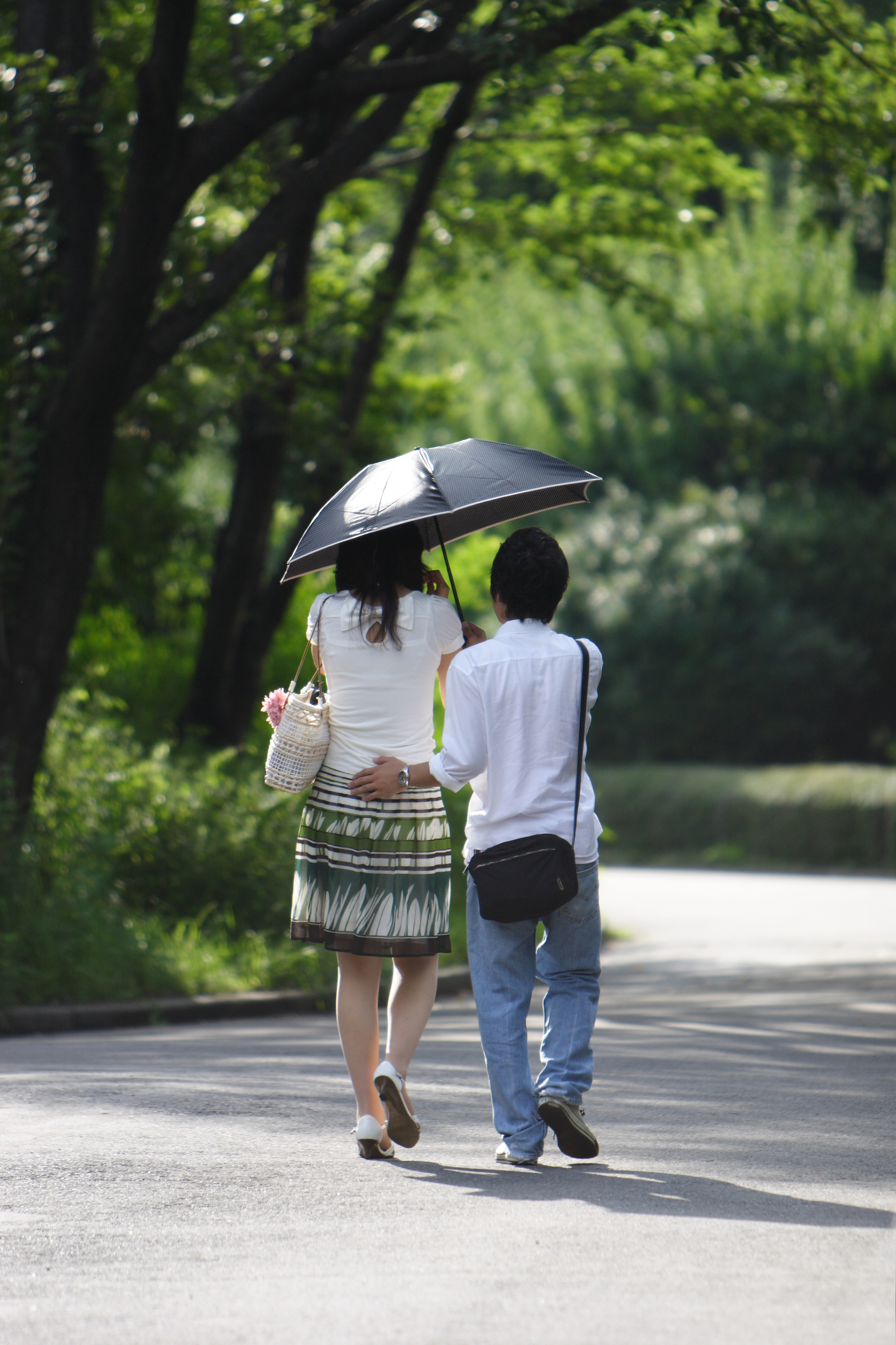 [MAP]